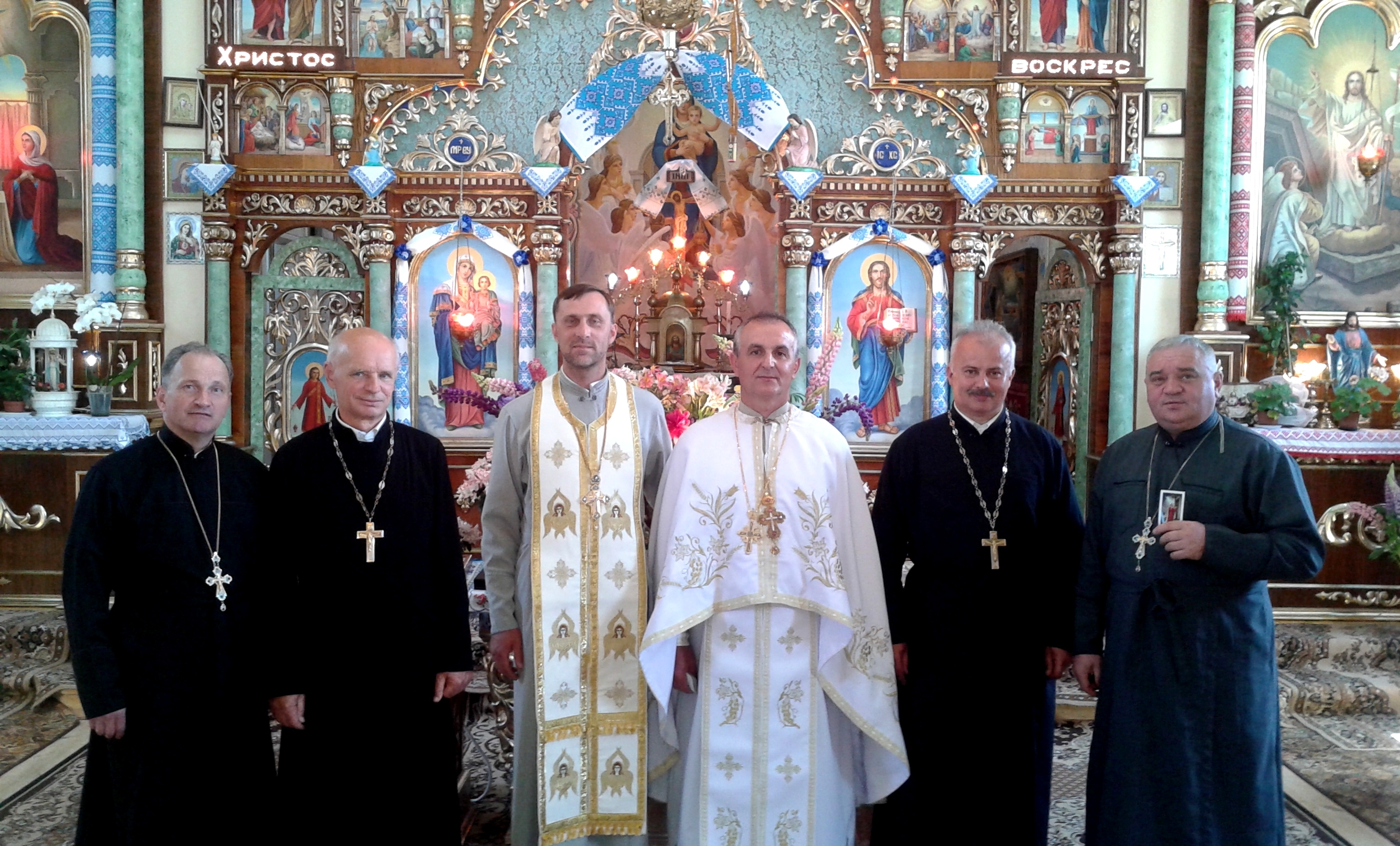 25.05.2014 р с. Піски Городоцького району, храм Свт.Іоана Золотоустого Української Автокефальної Православної Церкви святкування 20 річниці служіння на парафії отця настоятеля Богдана Сильвестер.